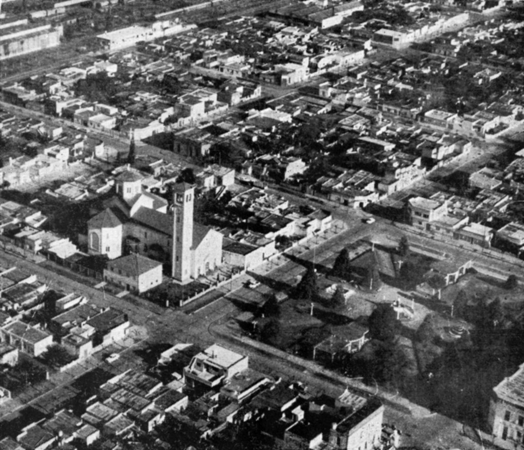 Vista aérea de la Plaza Sarmiento, en el Barrio Belgrano de la ciudad de Junín, Argentina. Se ve también la Iglesia Sagrado Corazón. Más atrás, a la izquierda, se alcanza a ver parte de las instalaciones de los Talleres Ferroviarios.